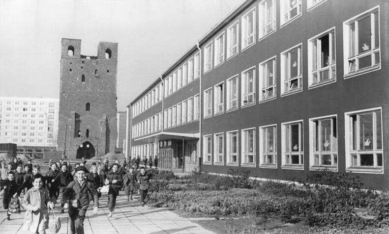 Magdeburg, Neubauviertel, Jakobstraße, Oberschule Zentralbild Ritter 28.10.1964 Sie haben Grund zum Fröhlichsein die vielen kleinen und großen Schüer der neuen Oberschule im Magdeburger Neubauviertel Jakobstraße. Neben 20 Klassenräumen, zwei Werkräumen und drei Räumen für de Fachunterricht, stehen den Schülern ein Speisesaal, eine Turnhalle und ein Hort zur Verfügung. Die Schule wurde mit einem Kostenaufwand von 2,3 Millionen Mark erbaut und zählt zu den modernsten Bildungsstätten des Bezirkes Magdeburg. Großes Interesse fand die Schule bisher bei ausländischen Gästen. UBz: Schulschluß